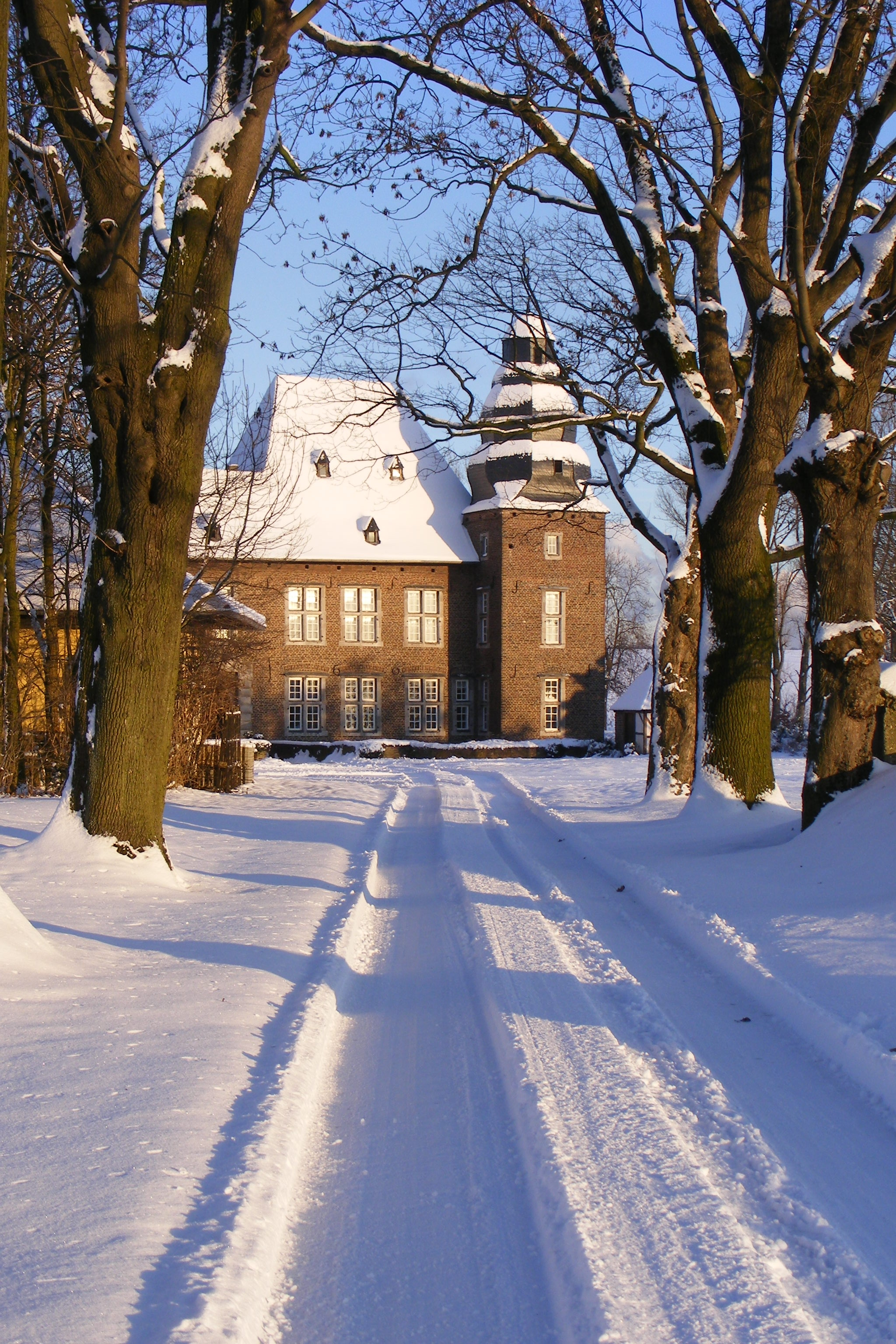 Gut Etgendorf, Blick durch die alte Allee auf das Herrenhaus aus dem Jahre 1605This is a photograph of an architectural monument., no. 0